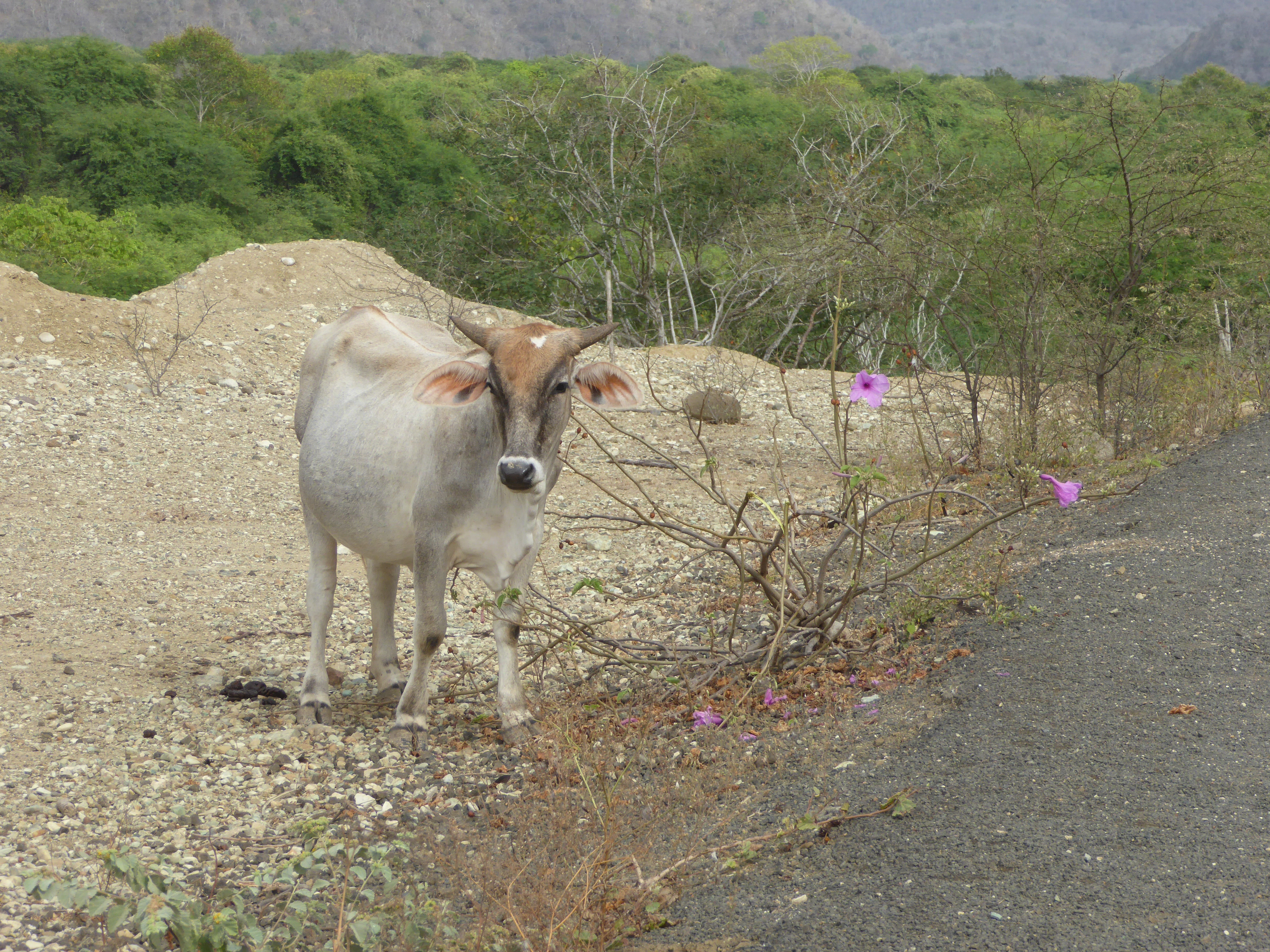 In der Kommune Agua Blanca